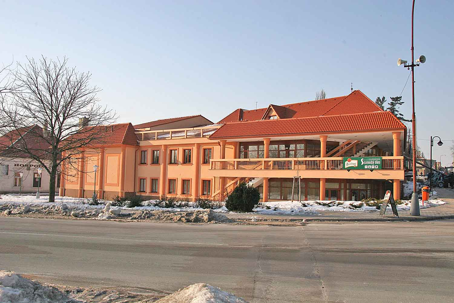 obecní dům v Sezemicích